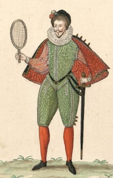 ensemble de relevé pour Gaignières des costumes.